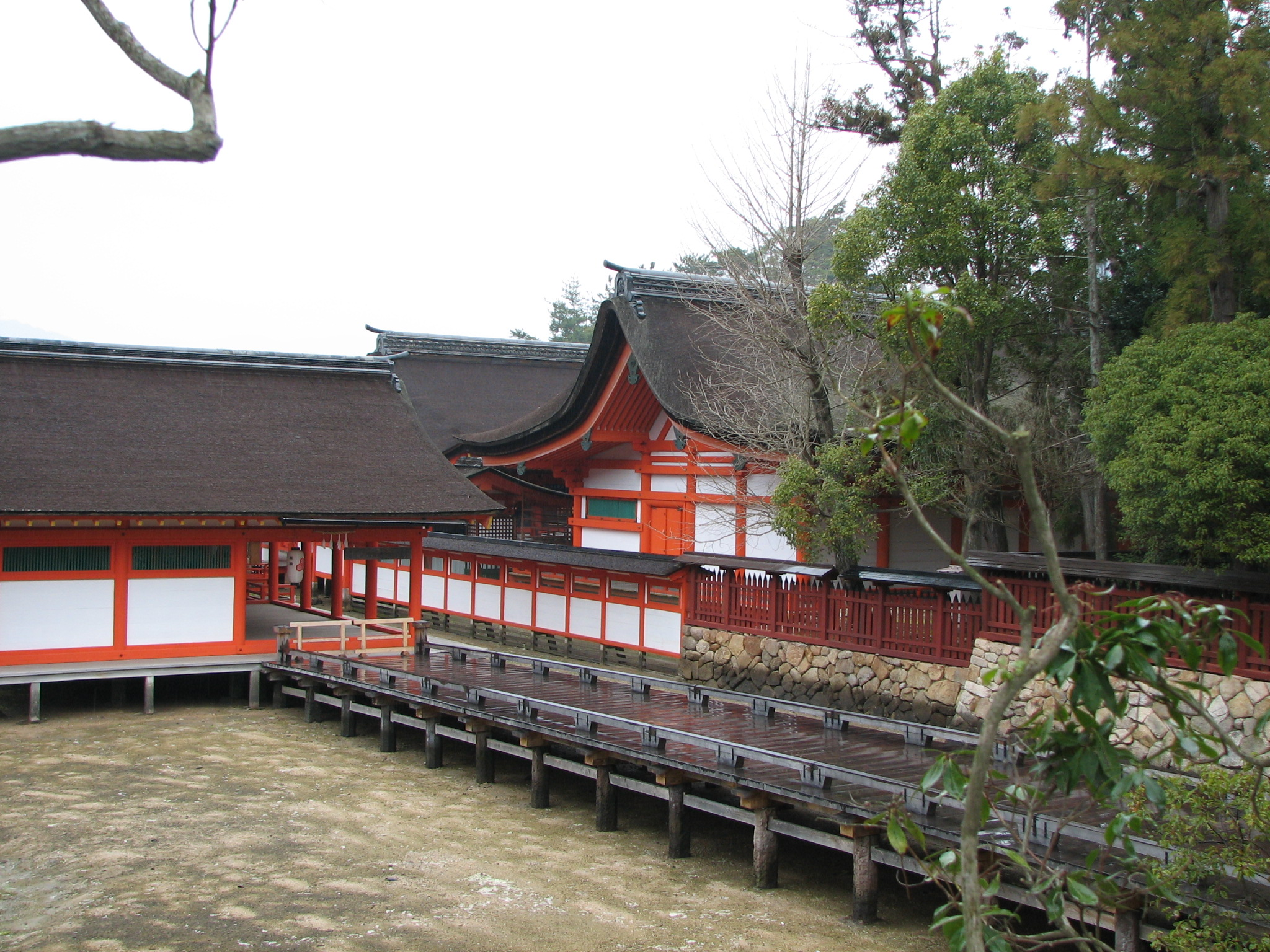 the honden of Itsukushima-jinja, Miyajima, Hatsukaichi, Hiroshima, Japan 厳島神社本殿（広島県廿日市市）